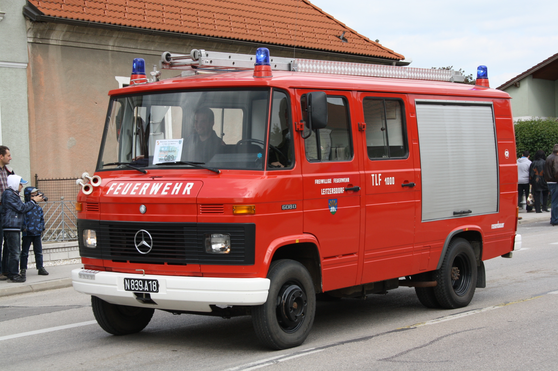 Einsatzfahrzeug der Feuerwehr Leitzersdorf